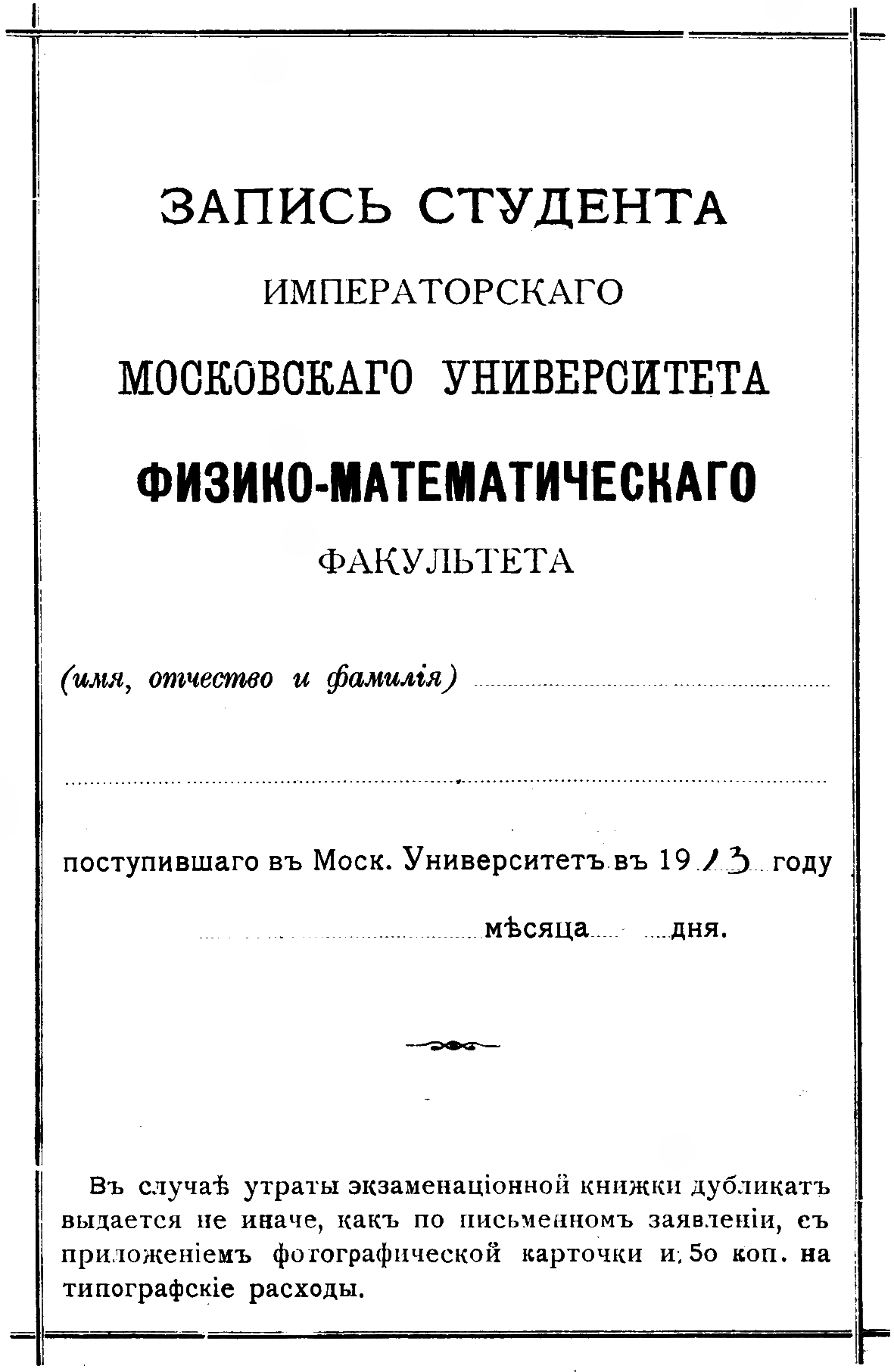 Студенческий билет Физико-Математического факультета, Императорский Московский Университет. 1913 год.